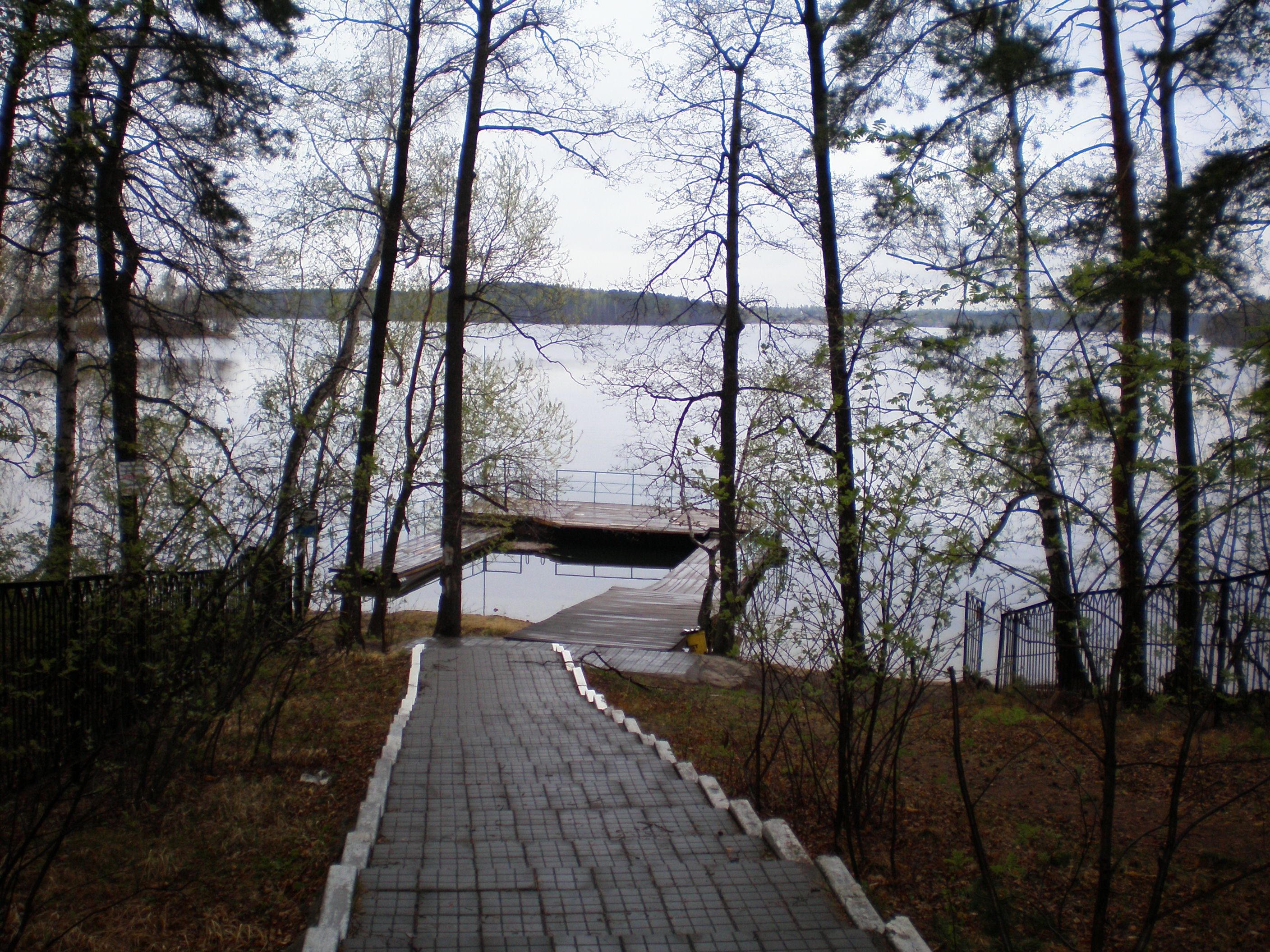 озеро Еловое